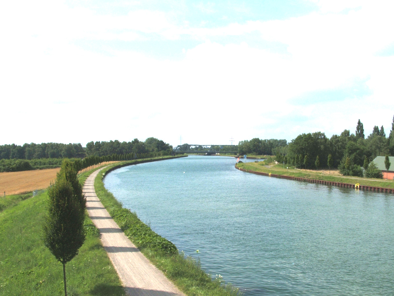 Dortmund-Ems-Kanal, alter Hafen in Schwieringhausen